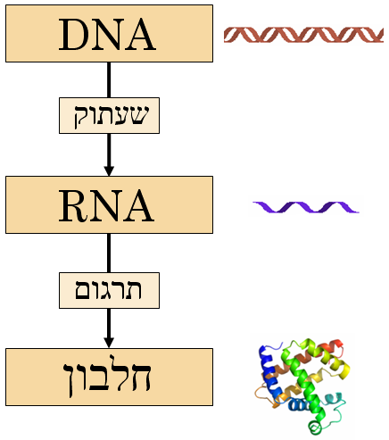 הדוגמה המרכזית של הביולוגיה המולקולרית